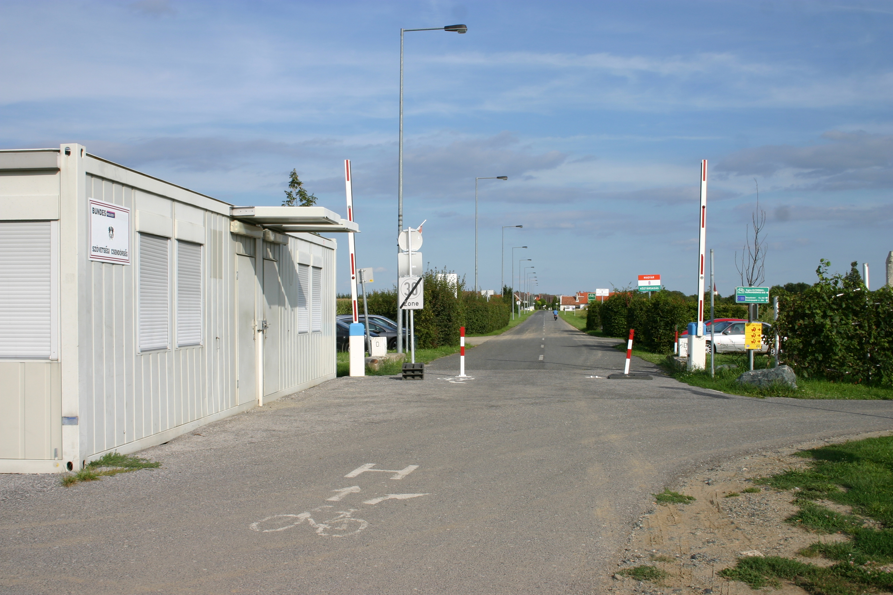 Lutzmannsburg Staasgrenze Österreich/Ungarn